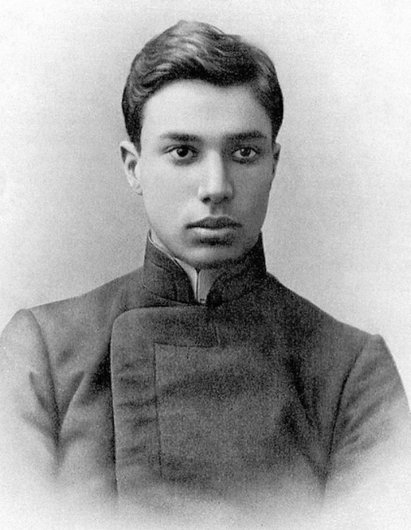 Борис Пастернак в гимназической форме